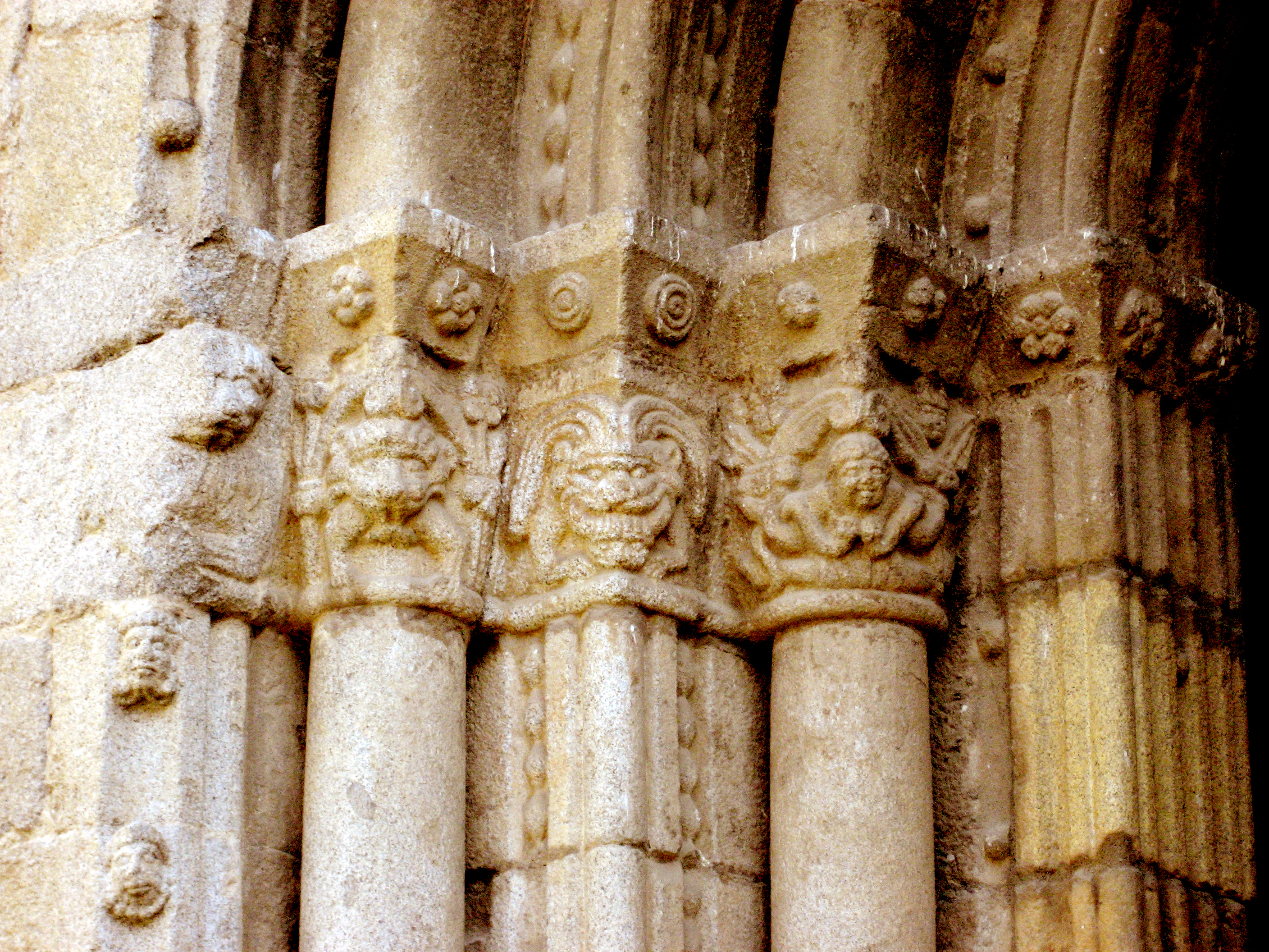 Capiteles de la portada norte de la catedral de la Seu d'Urgell, en Cataluña (España)